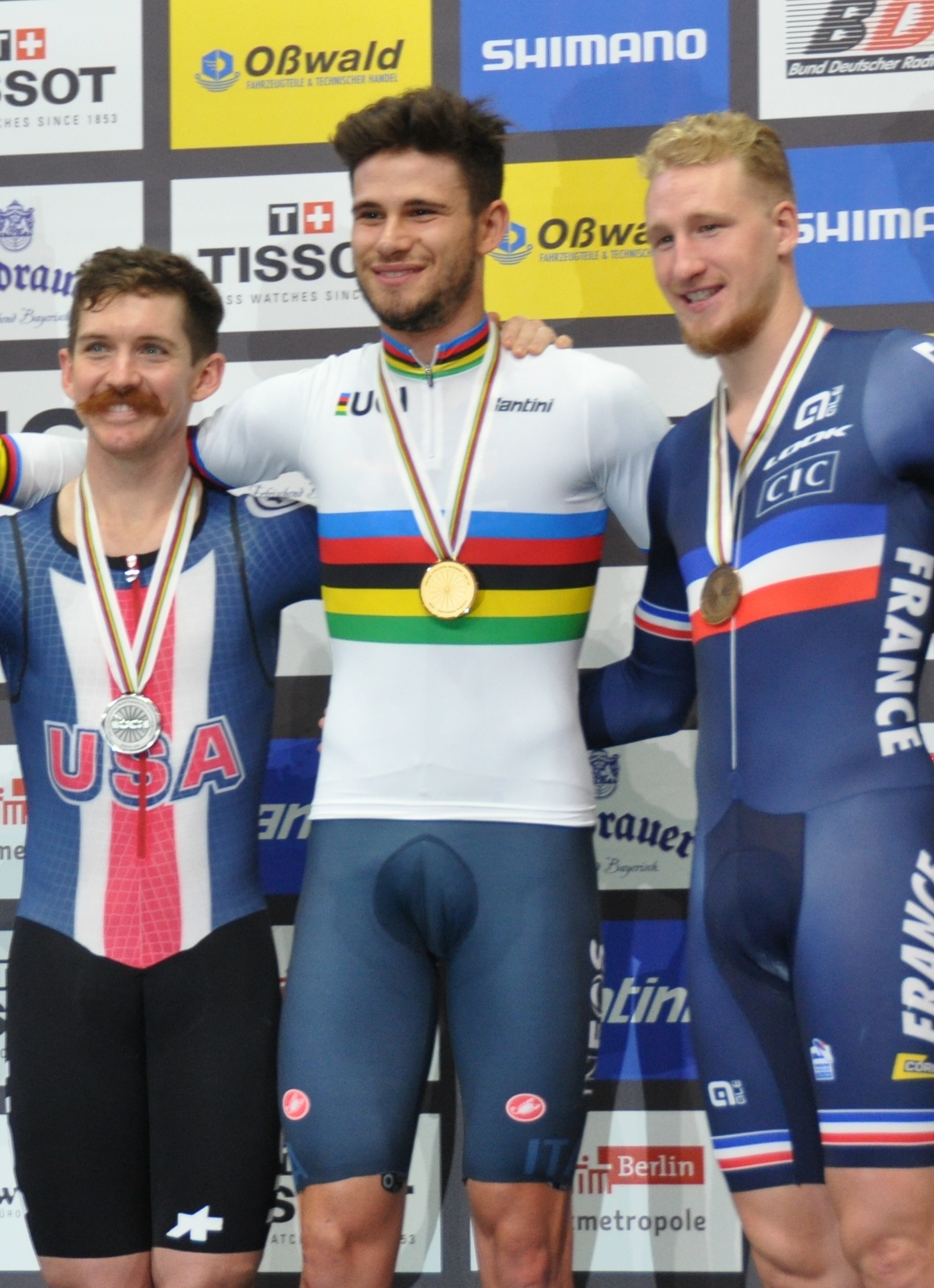 Podium Einerverfolgung (v.l.n.r.): Ashton Lambie, Filippo Ganna, Corentin Ermenault